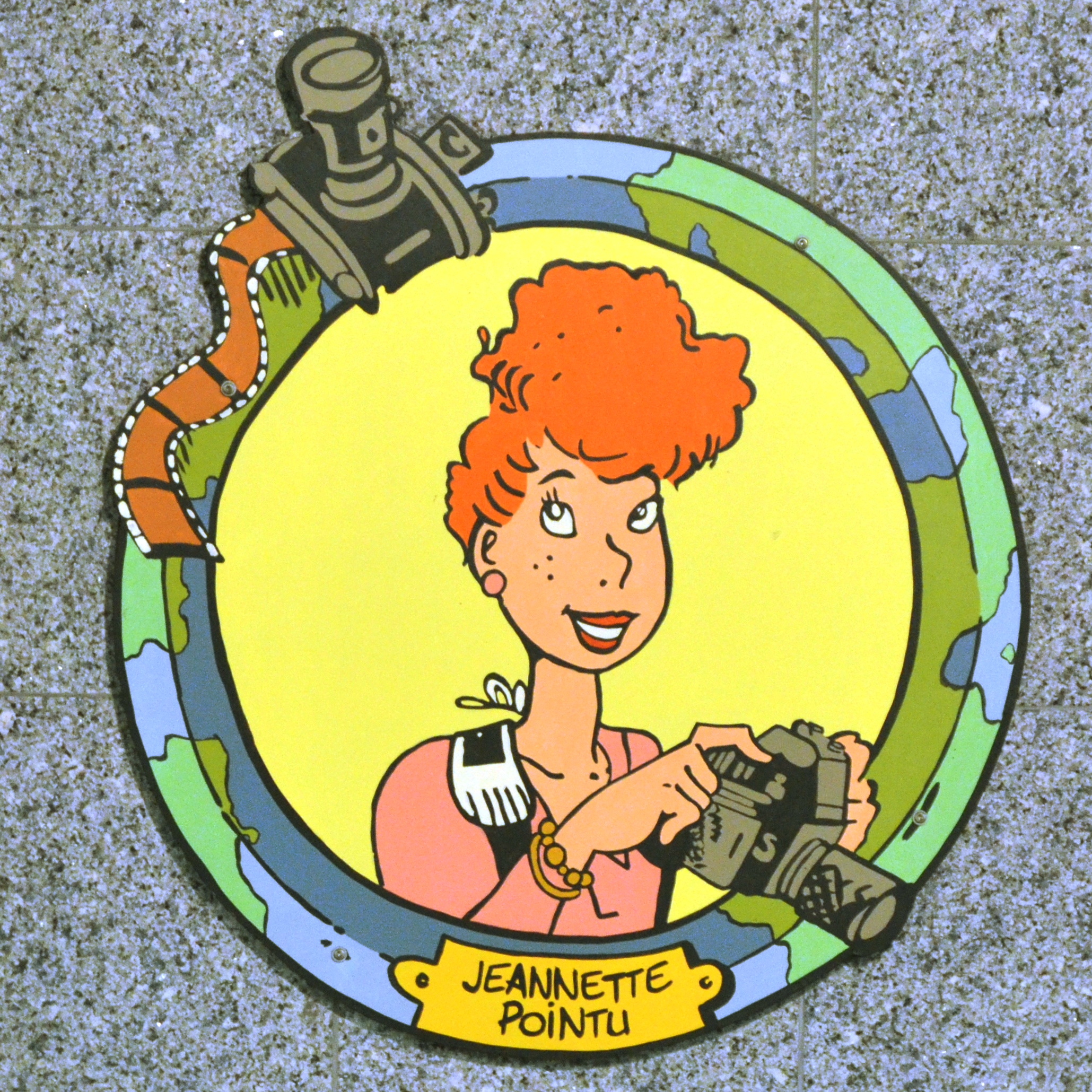 Charleroi (Belgique) - Station Janson du métro léger. Jeannette Pointu